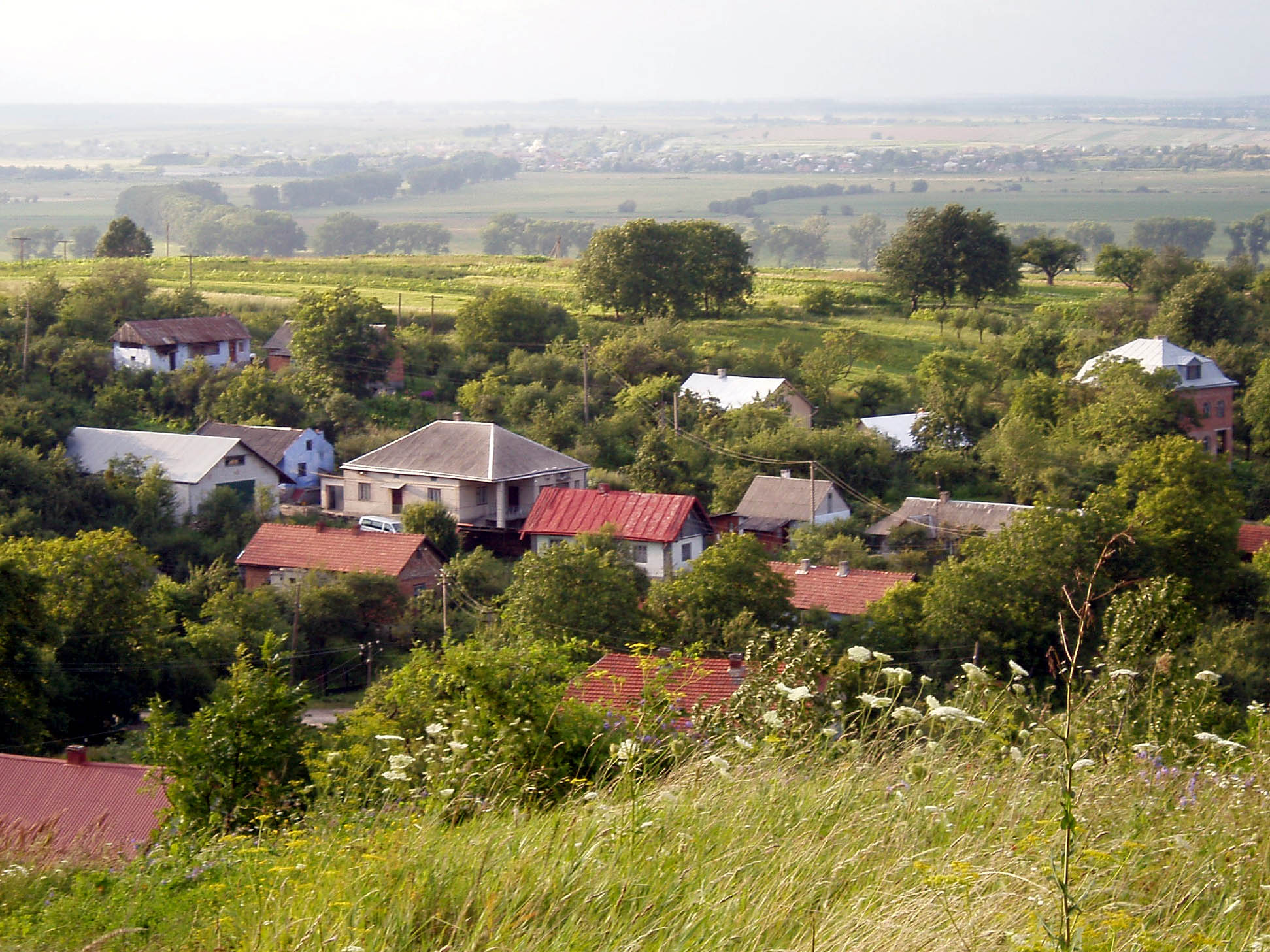 Село Гринів Пустомитівського району.